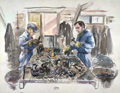 Tekening Nol van Wezel en Max Kannewasser. Tekening Leo Kok, 1944